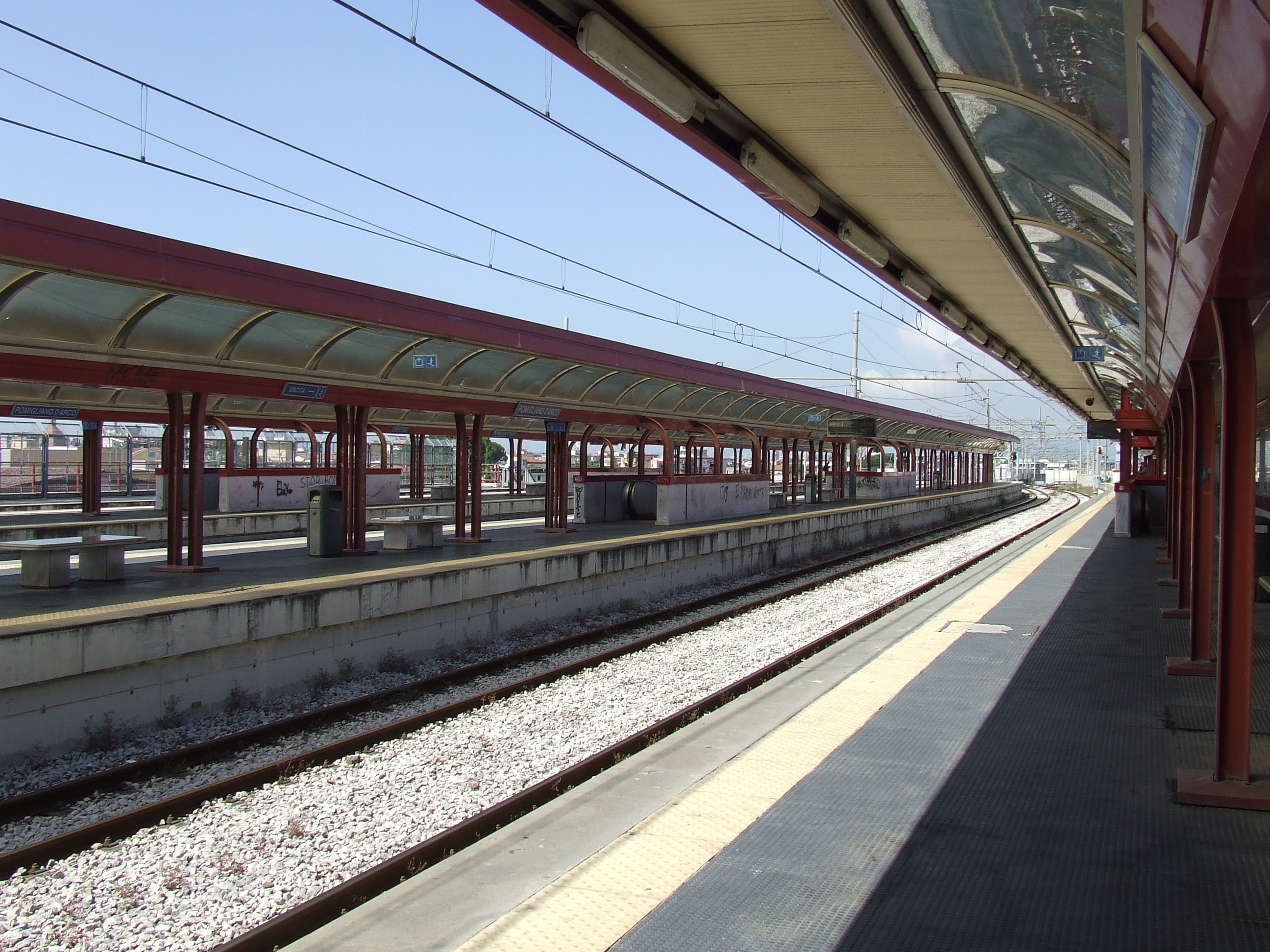 Stazione di Pomigliano d'Arco, linea Napoli - Nola - Baiano, Circumvesuviana, EAV - area banchine su viadotto